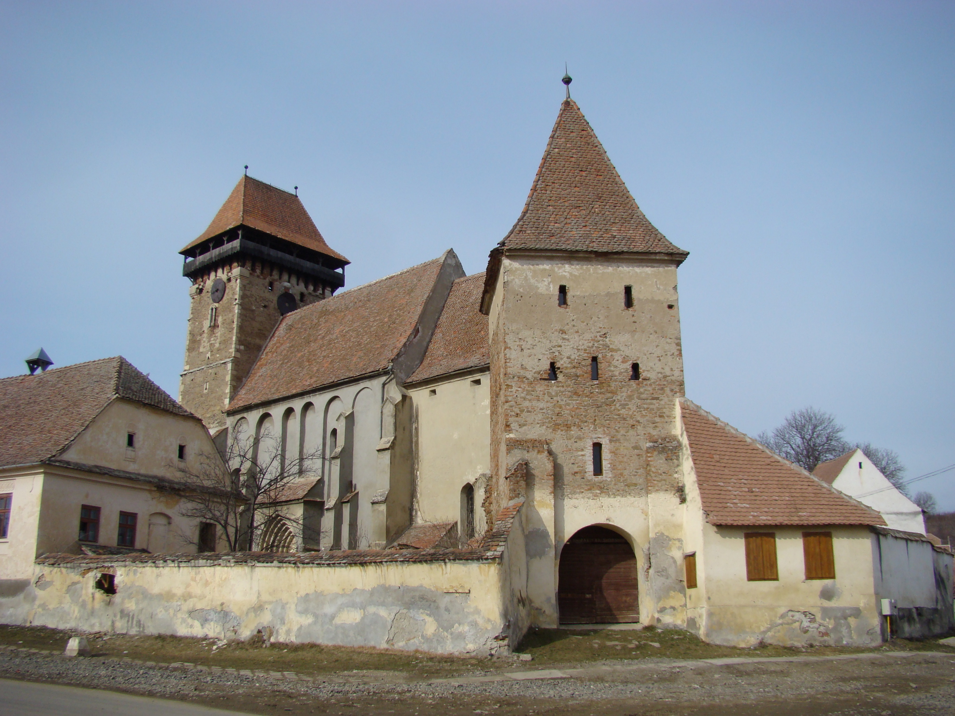 Ansamblul bisericii evanghelice fortificate, sat BĂGACIU, județul Mureș